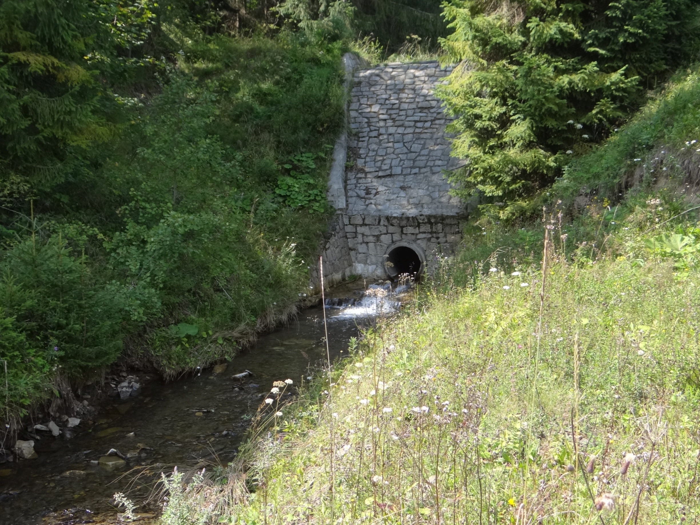 Podlapšianka